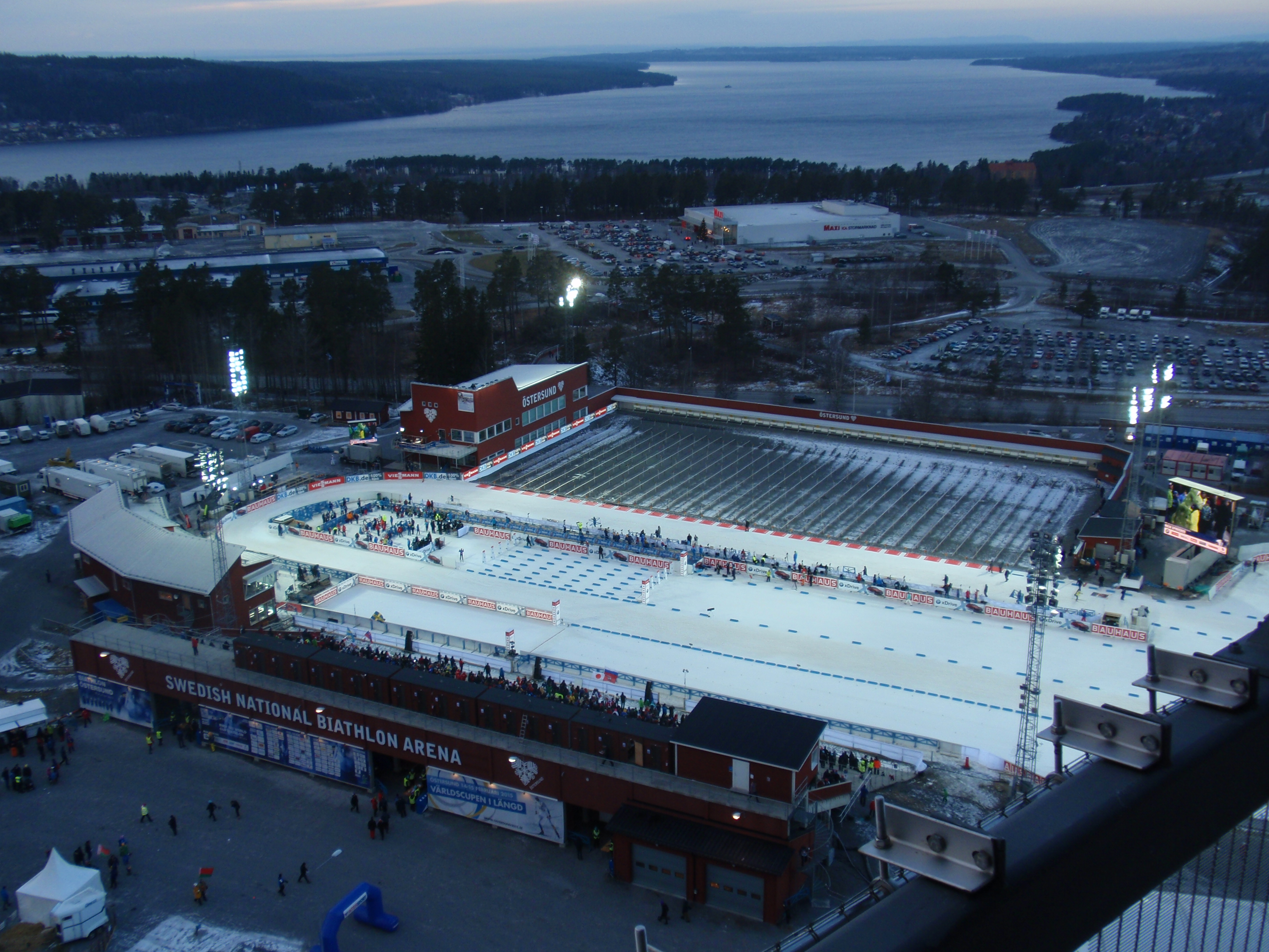 Östersunds skidstadion bilden tagen från Arctura